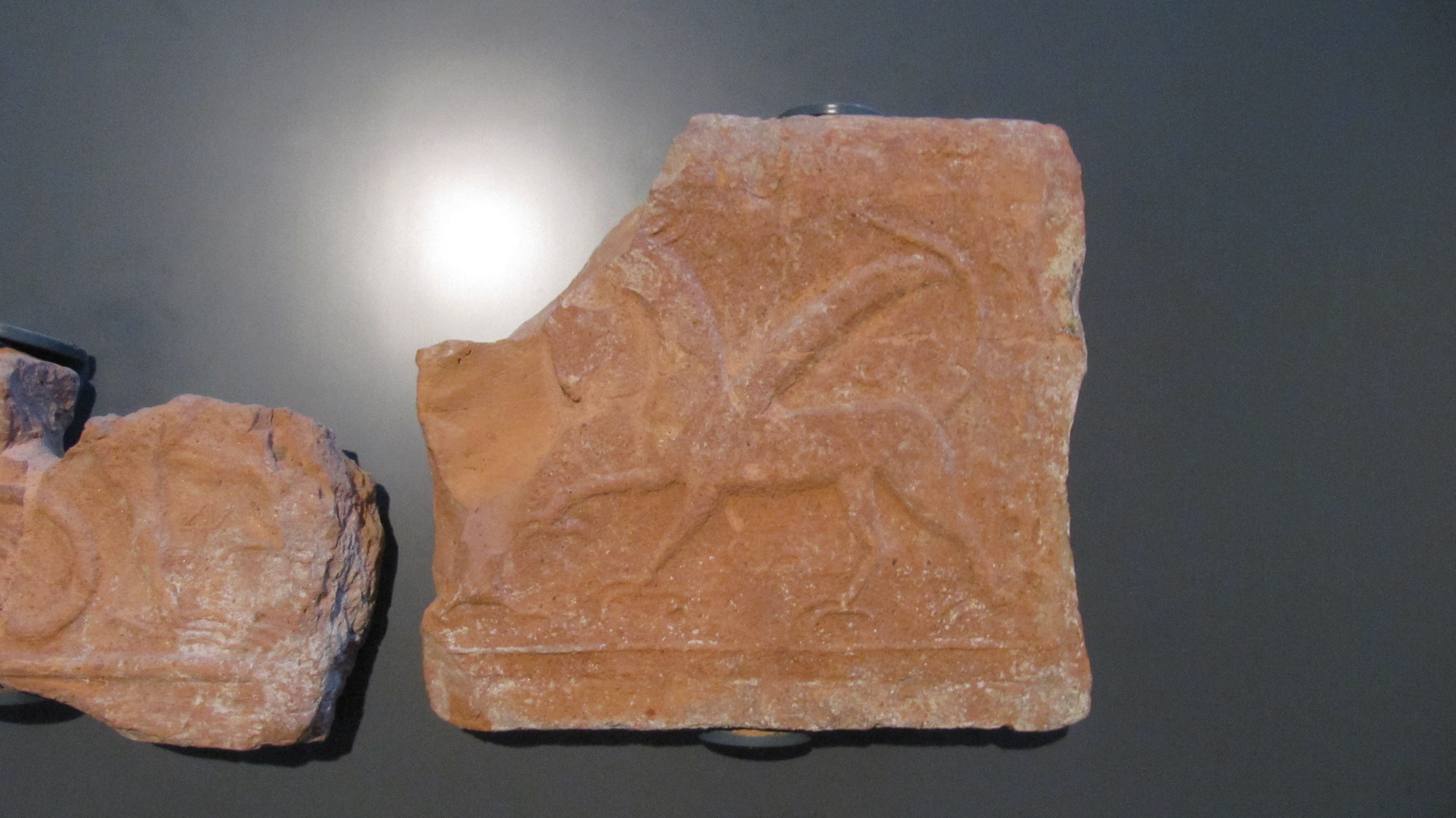 Terracotte architettoniche di San Salvatore, VIII secolo, museo di Santa Giulia, Brescia